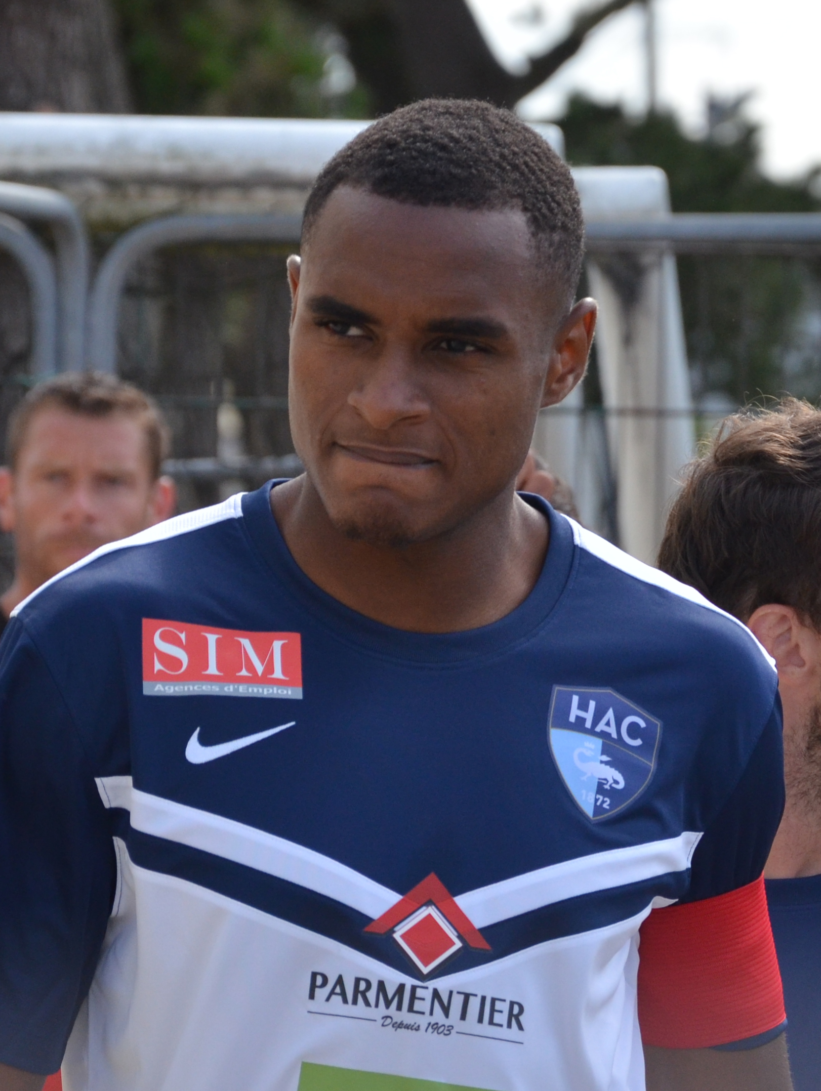 Photographie prise lors du match opposant le Stade rennais au Havre AC en amical au stade Paul-Audrin de Dinard le 8 juillet 2015. Ici, Steven Fortes.